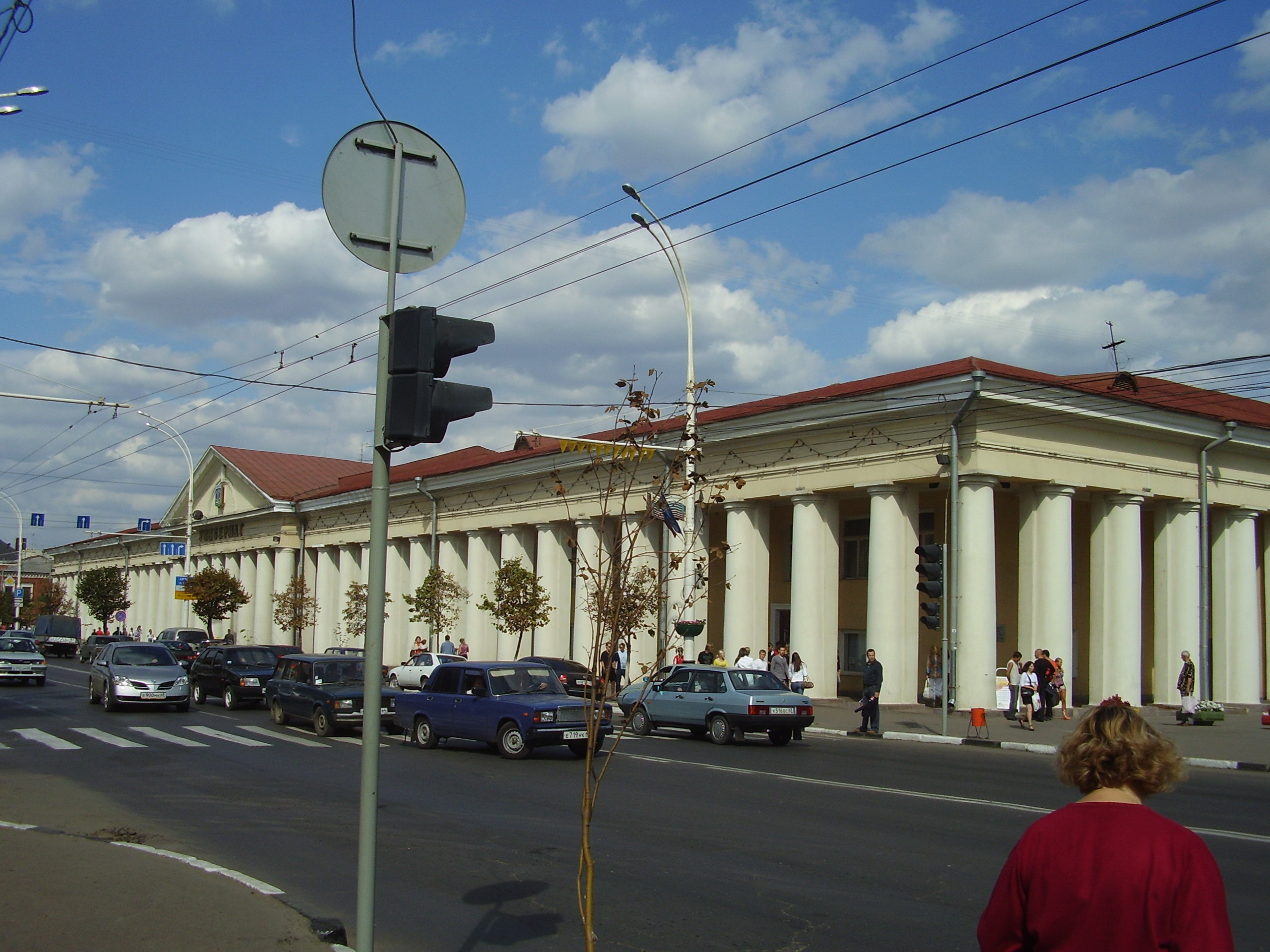 Универмаг_в_Тамбове на улице Советской